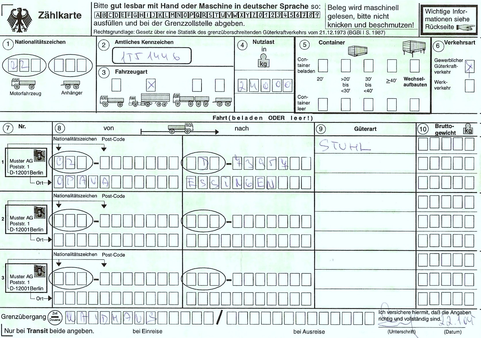 Zählkarte BRD für die Grenze. Nur für den Güterkraftverkehr.